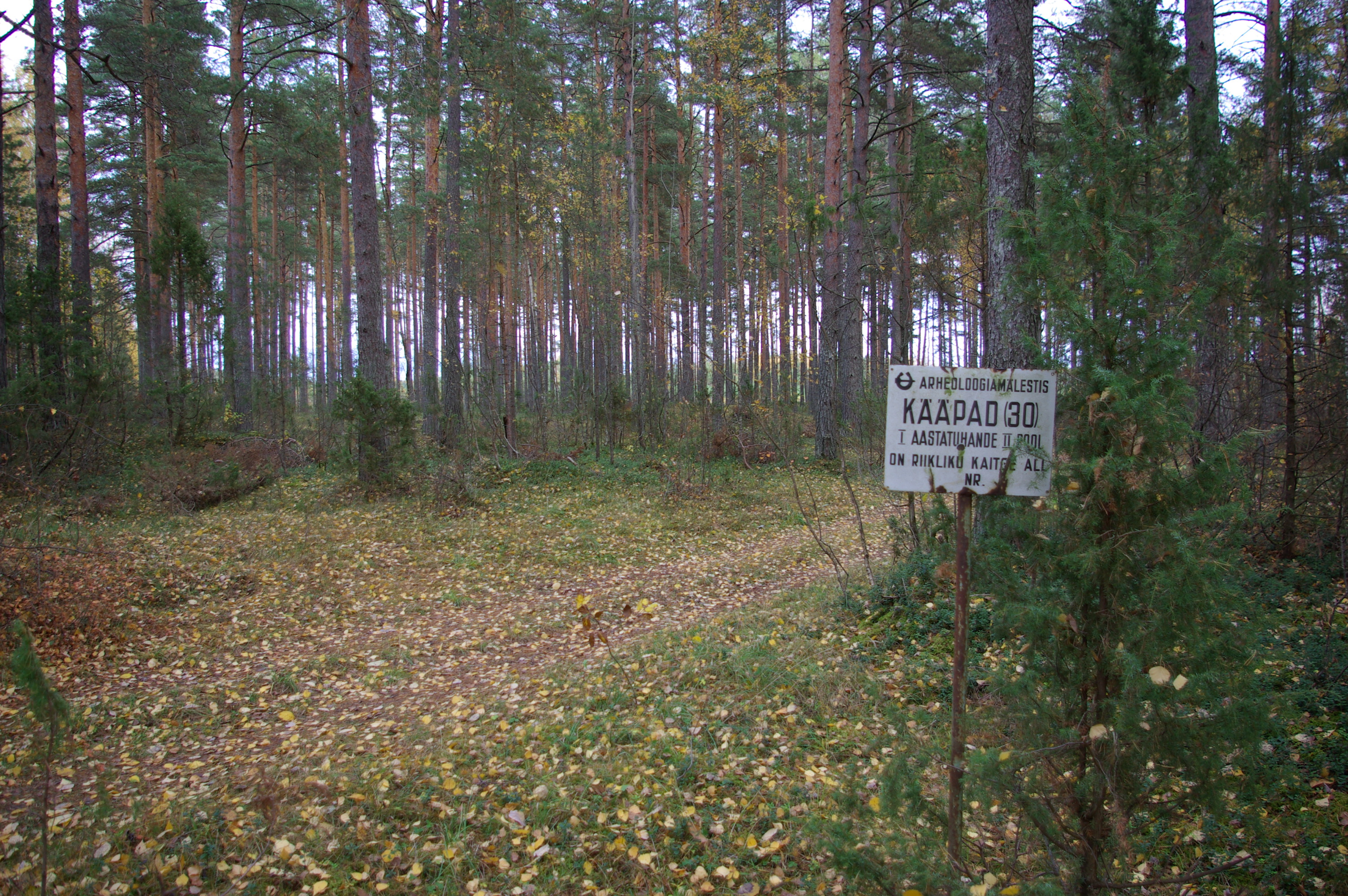 Sakalovapalo kääpad